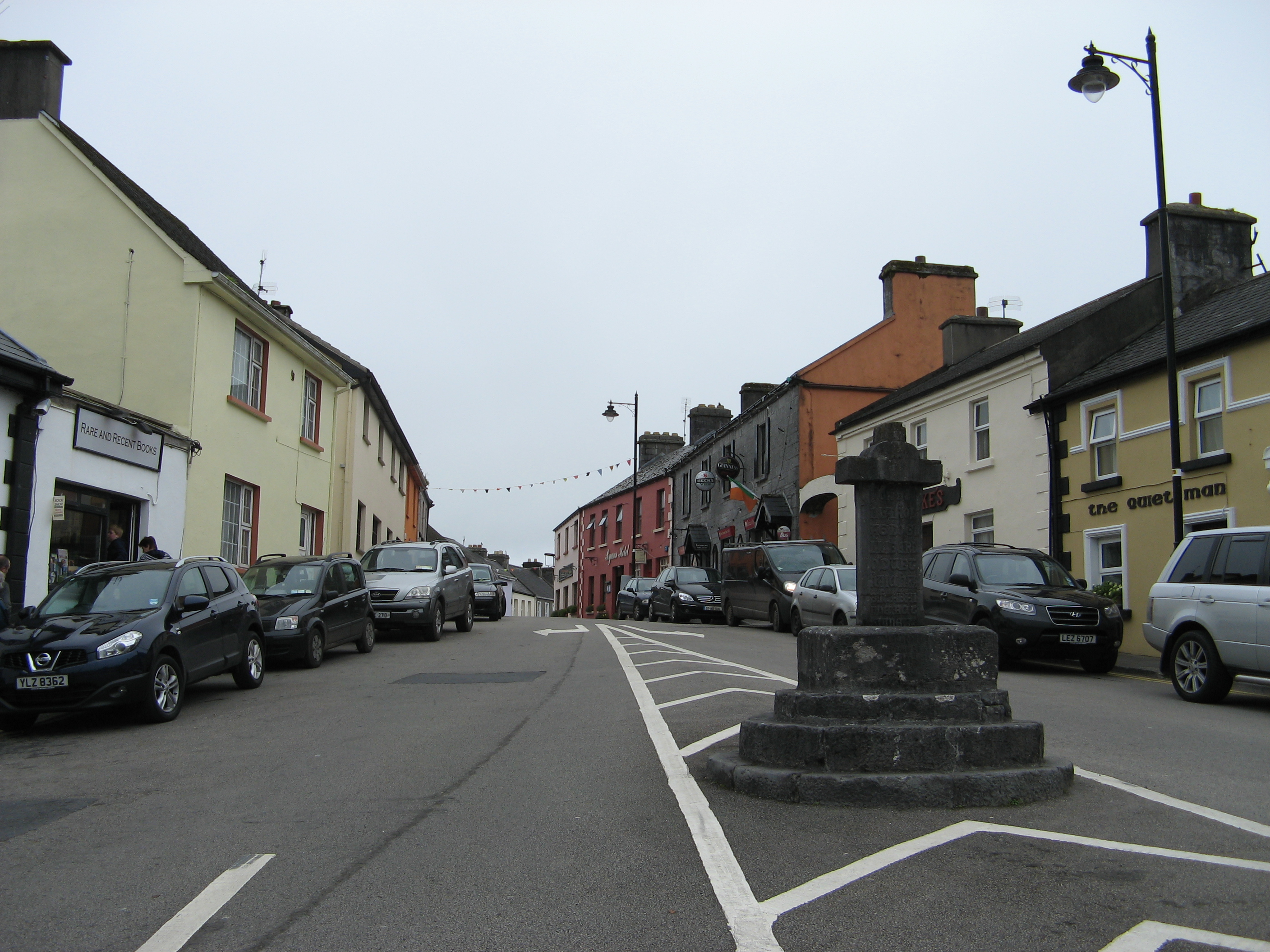 Cong, comté de Mayo, Irlande : main street.